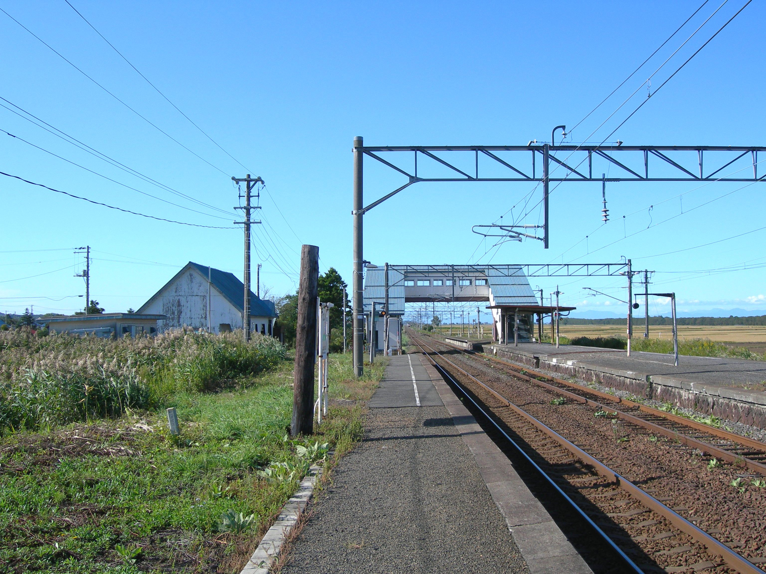 光珠内駅ホーム